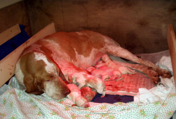 Bracco